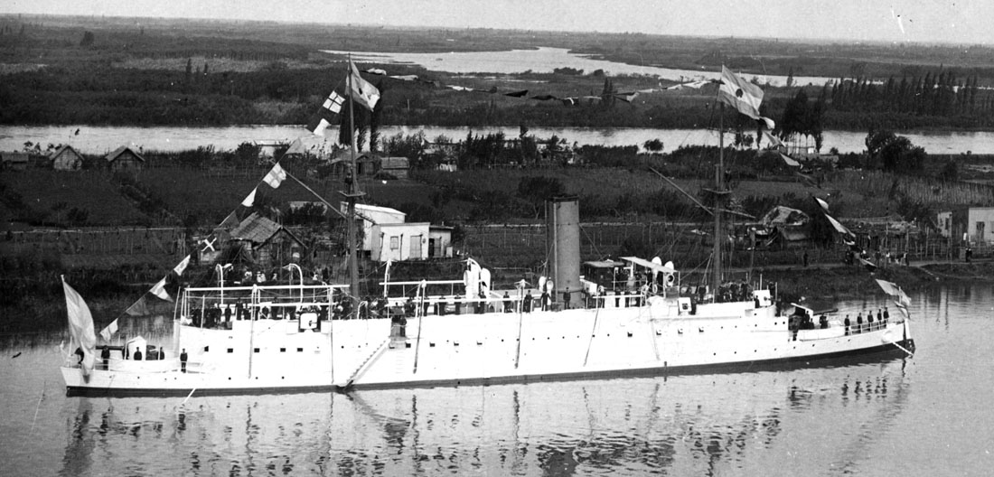 Crucero Patagonia. Flota de la Armada Argentina. 1887.